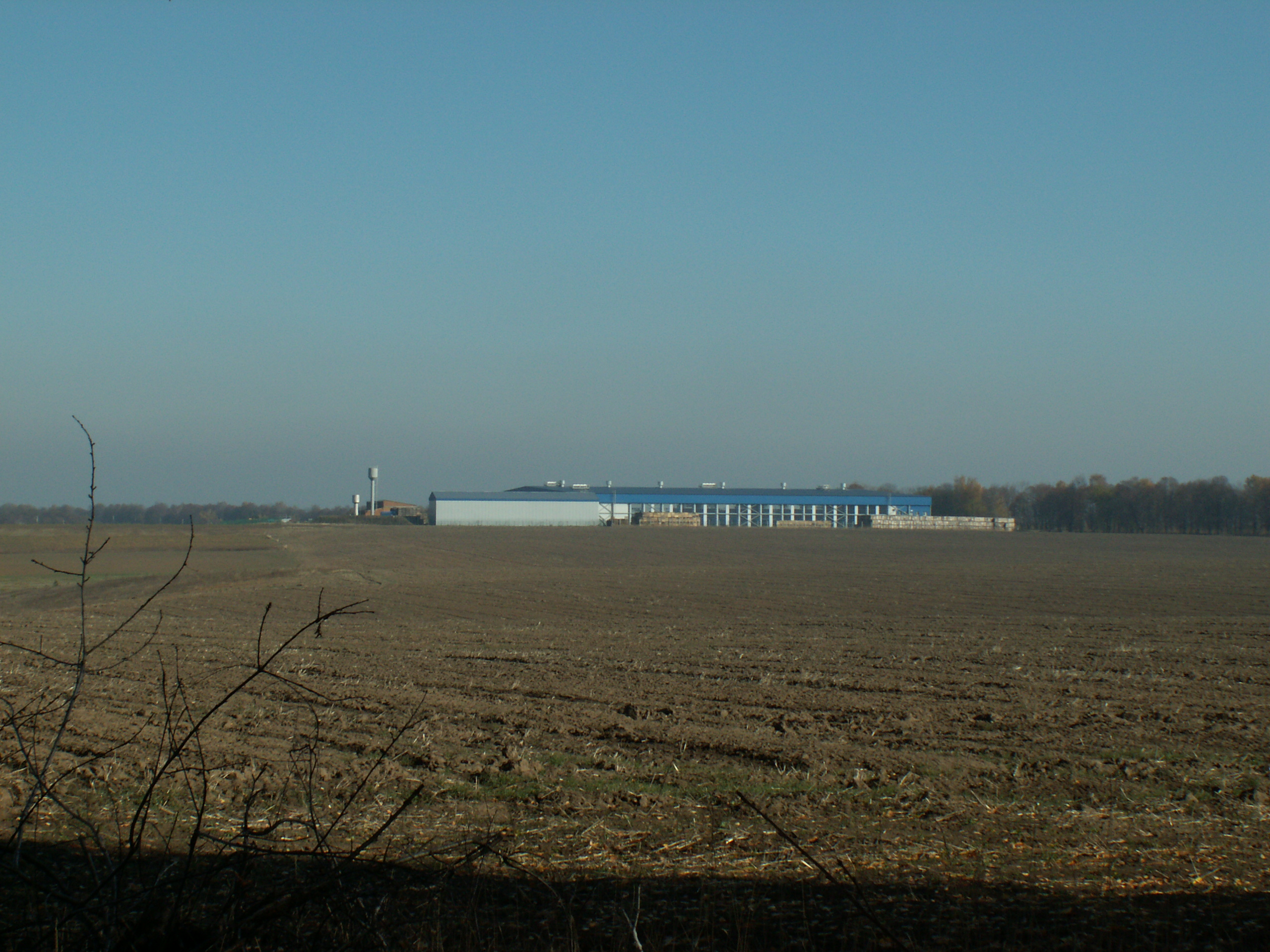 Комплекс "АГРОЕТАЛОН". Вигляд з Василівки